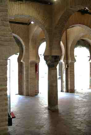 La Mosquée de Ternerias vue de l'intérieur, premier étage